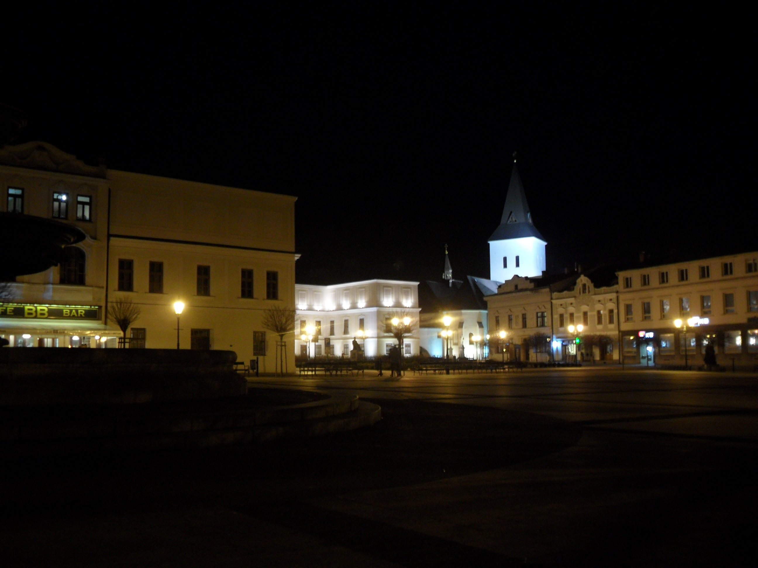 Zámek Fryštát v roce 2018